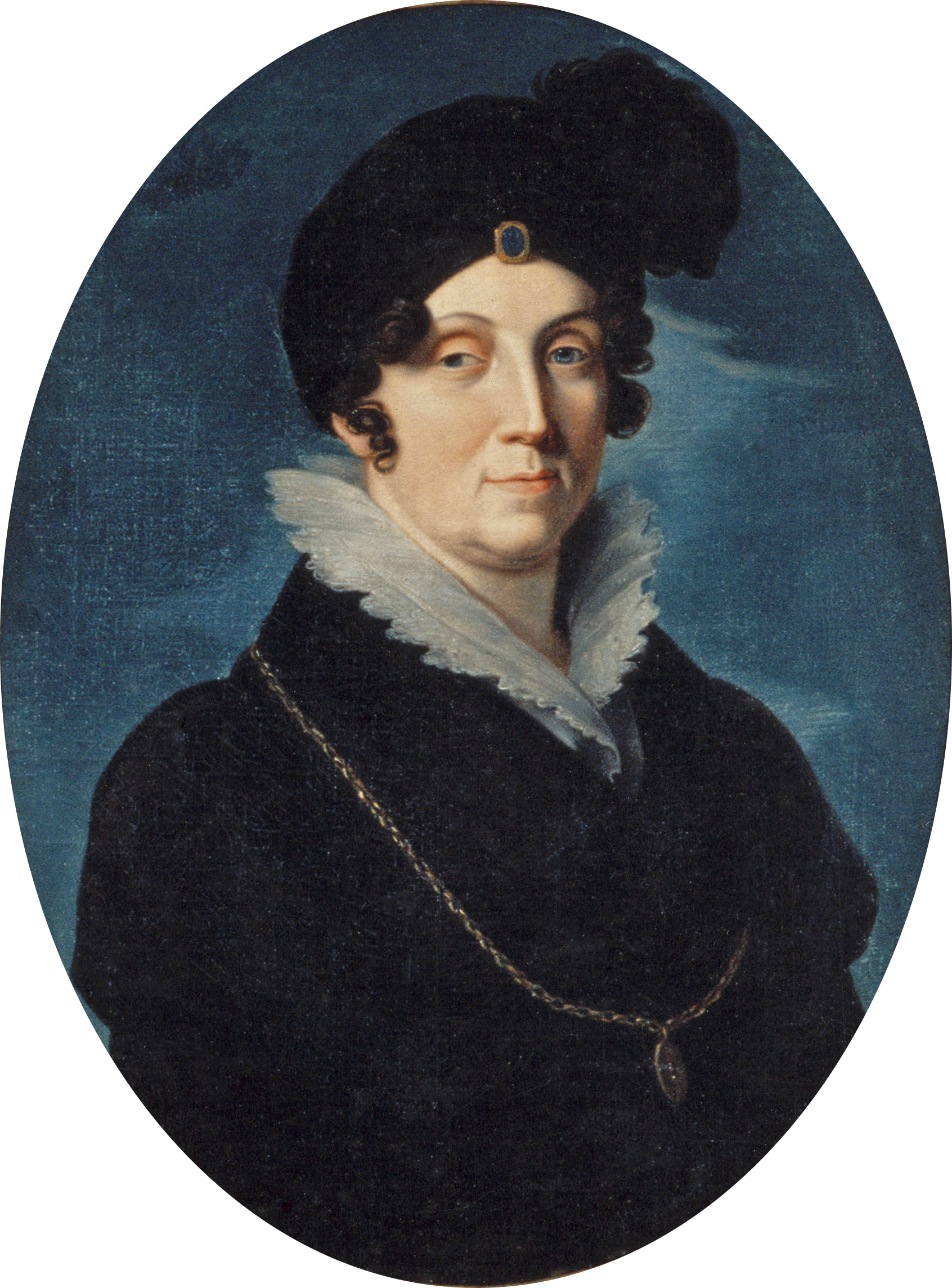 Amalie von Hessen-Darmstadt (1754-1832)